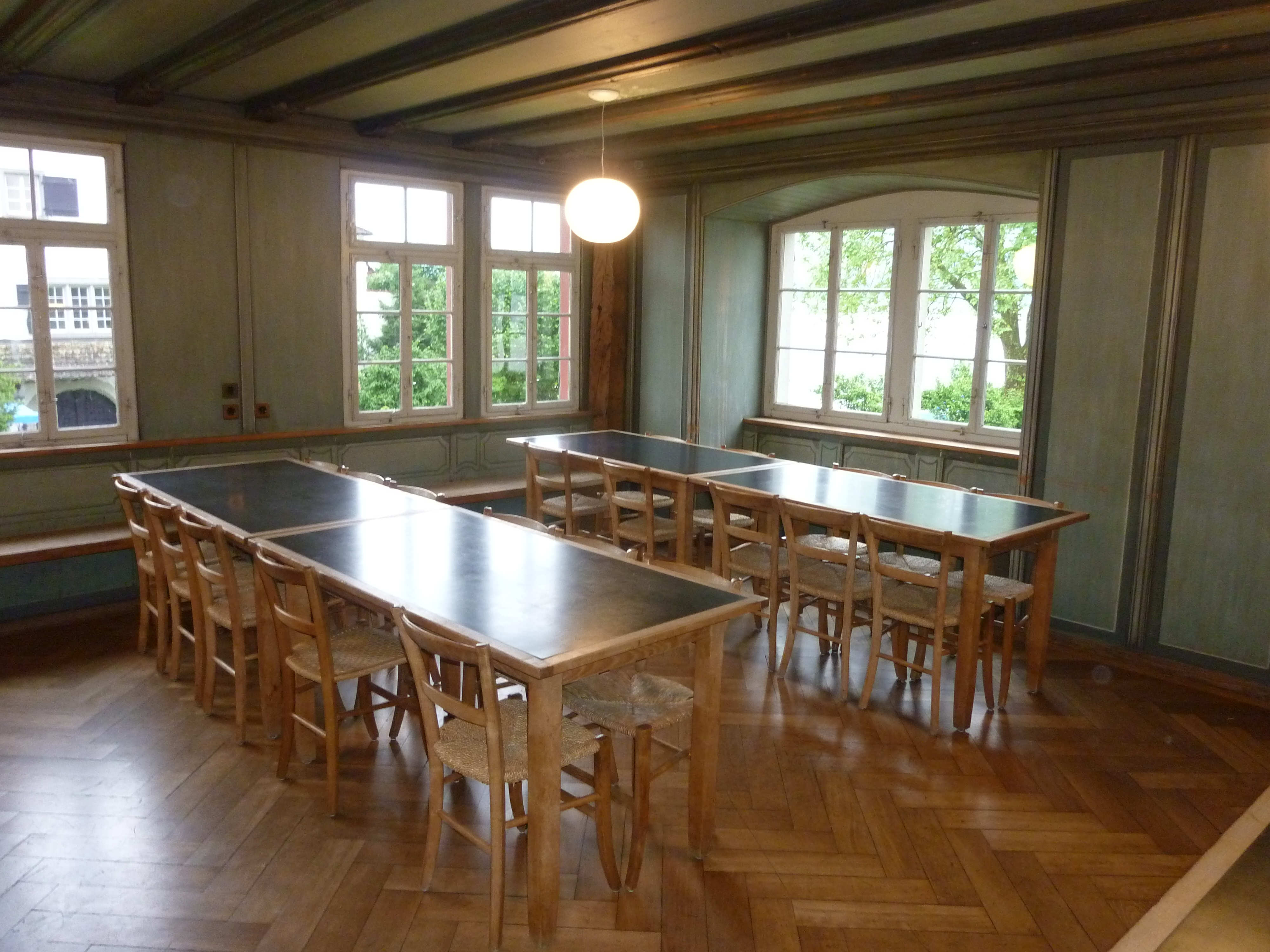 Ritterhäuser Uerikon: Essraum im Ritterhaus